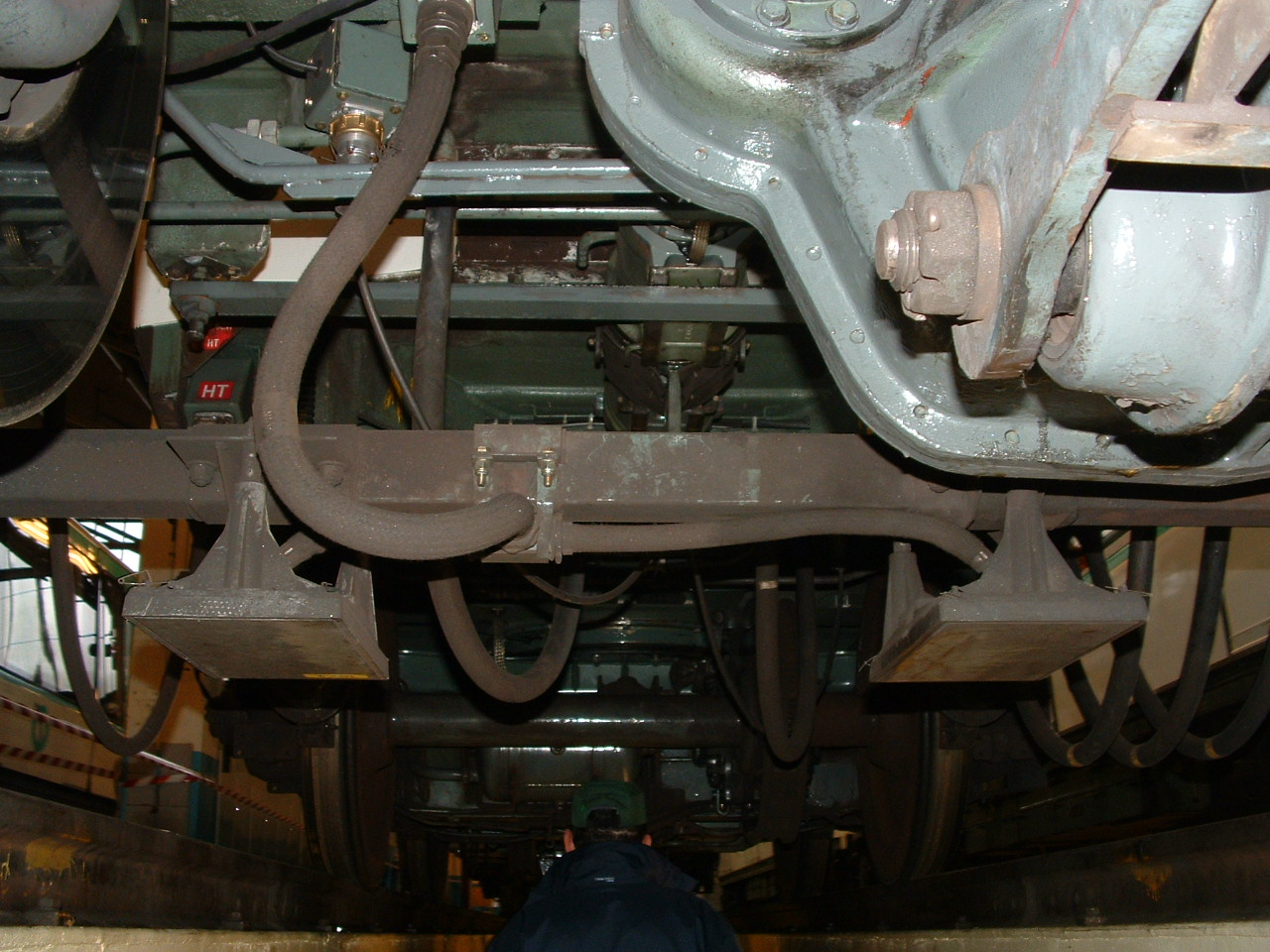 Lecteurs des tapis de pilotage automatique sur un train MF 77 aux ateliers de Choisy.